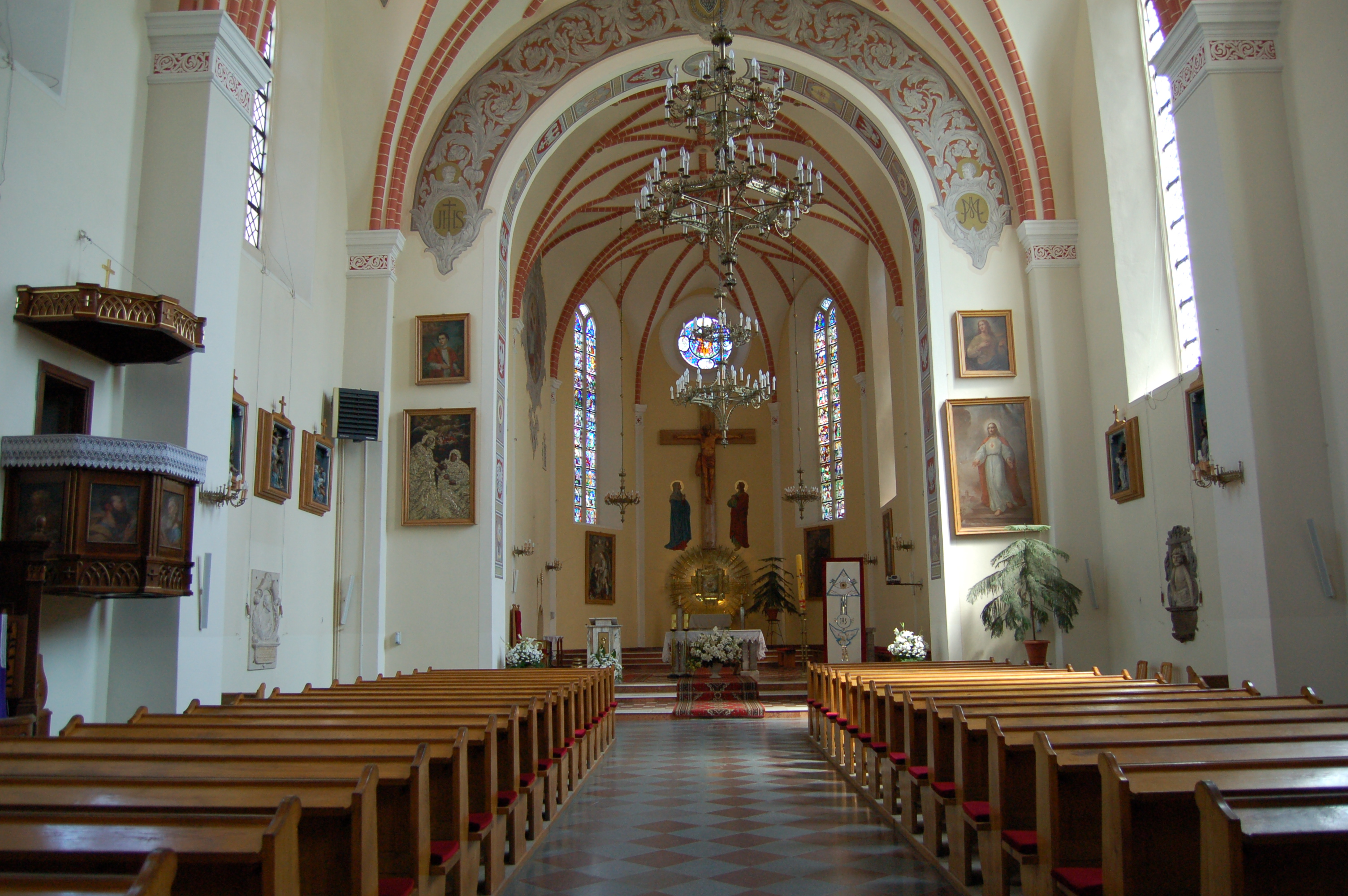 Przasnysz, wnętrze kościoła św. Jakuba i św. Anny, 1609-1616, 1786-1789